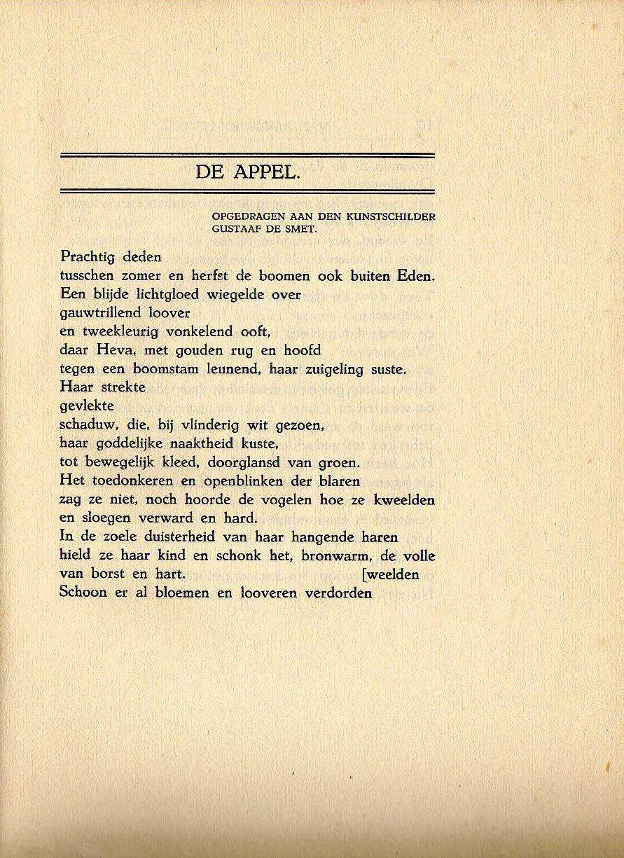 Bladzijde 9 van "Van Aarde en Hemel" van René de Clercq, uitgegeven in 1915 in Amsterdam bij L. Simons. Het eerste gedicht uit deze uitgave is "De Appel", opgedragen aan kunstschilder Gustaaf de Smet (1877-1943)